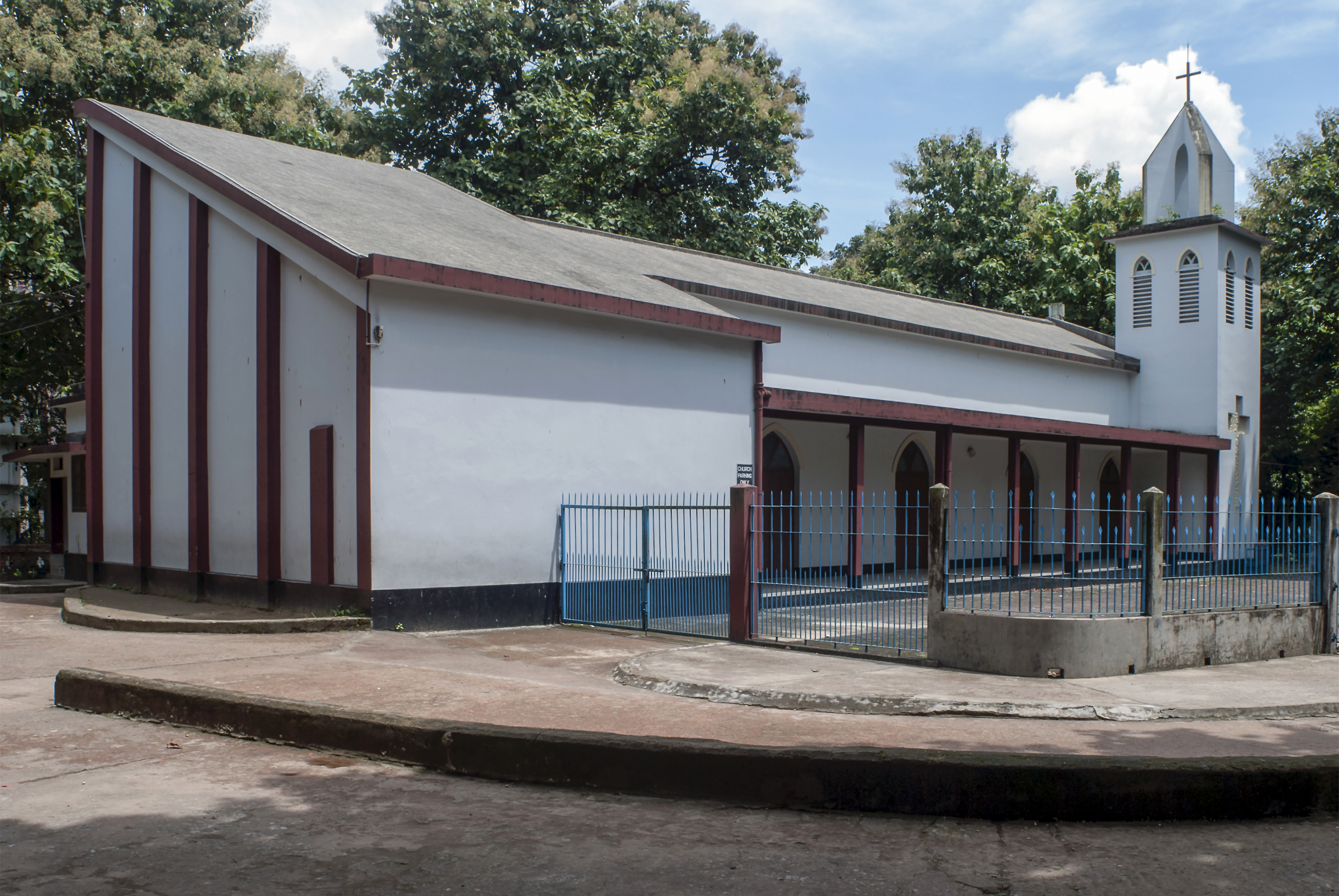 নির্মলা মারিয়ার গির্জা